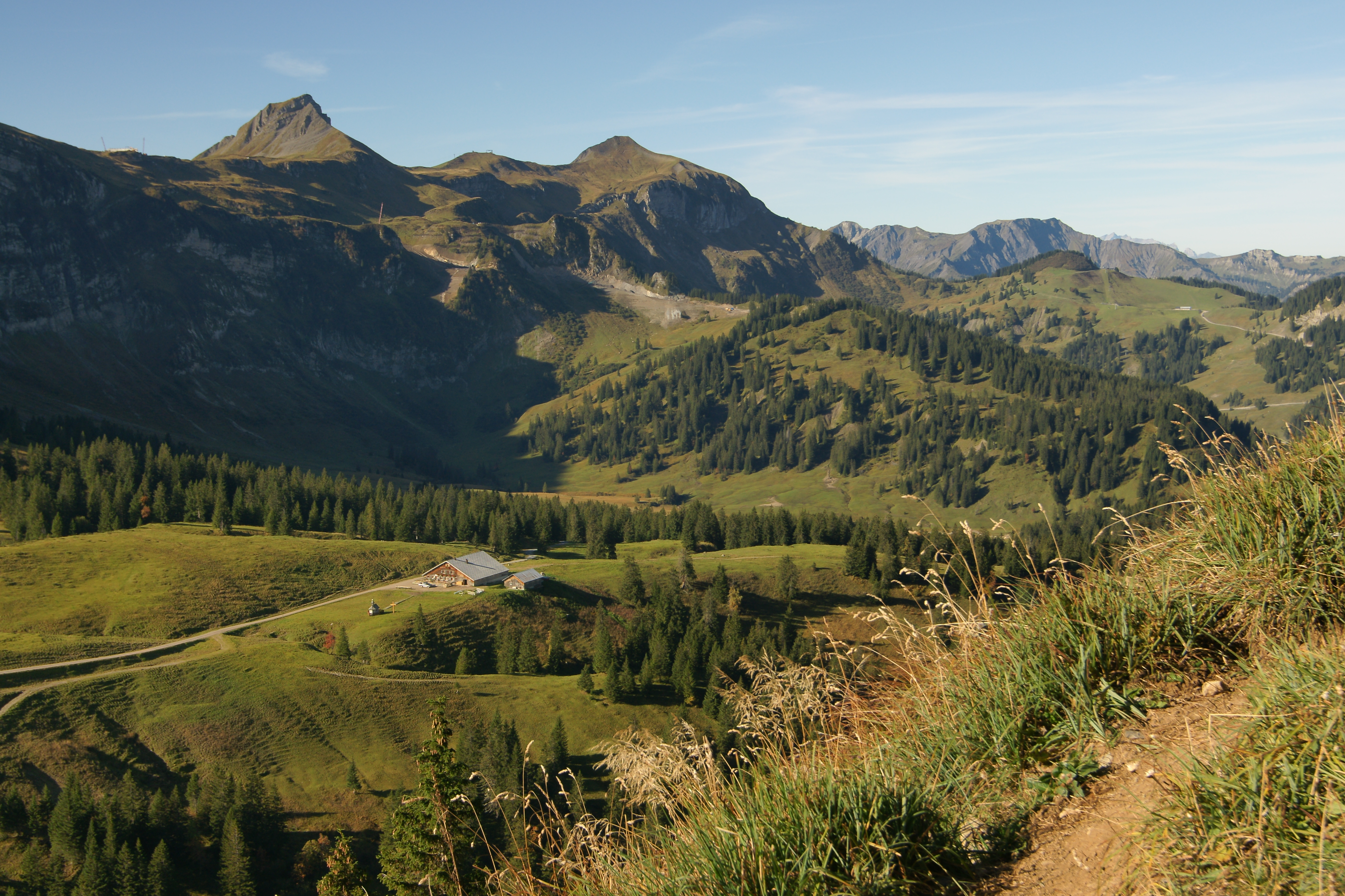 Auf dem Weg zur Kanisfluh richtet sich der Blick über die “Wurzachalpe” auf 1.622m, die im Bau befindliche Gipfelbahn (Skiverbindung Mellau - Damüls) auf der Hohen Wacht, die Damülser Mittagsspitze, das Hohe Licht und der Hochblanken 2068m. Am rechten Bildrand sieht man die Alpe Wildgunten auf 1.610m Höhe.